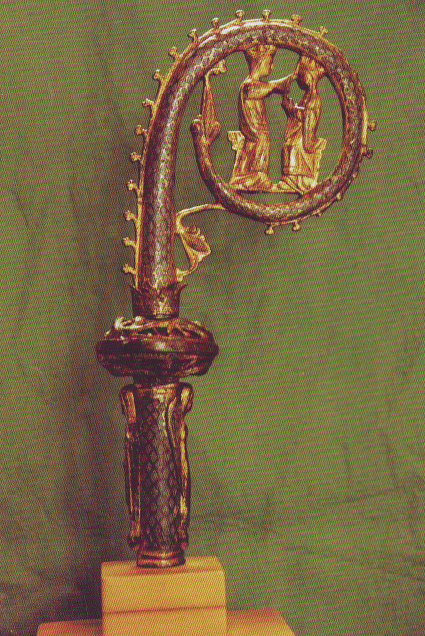 Crosse en cuivre émaillé du XIIIème siècle. Emaux limousins. Vers 1220-1235. Cuivre embouti, champlevé, gravé, émaillé et doré. Email bleu moyen. Hauteur 32,7 cm - Largeur 18 cm Couronnement de la Vierge dans la volute. Annonciation sur la douille. Visible au musée de l'Hôtel Gouin à Tours. Trouvée par Monsieur Paillaud dans la salle capitulaire de l'Abbaye de Villeloin à Villeloin-Coulangé